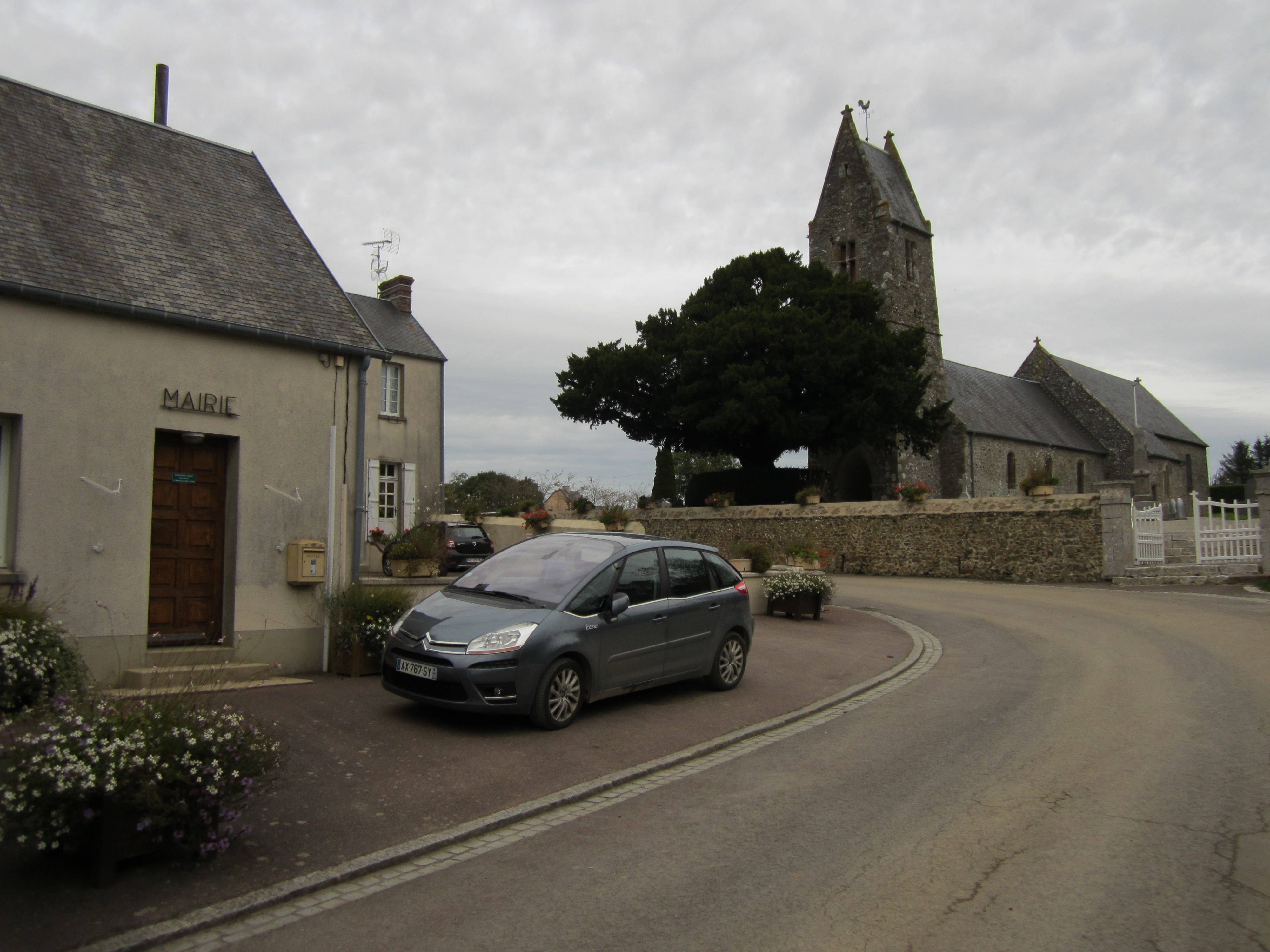 Brainville, Manche